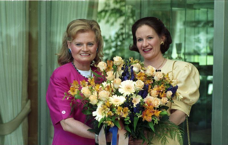 3.7.1991 Frau Verity van der Tas (Gattin des niederl. Botschafters) überreicht Frau Hannelore Kohl im Namen von Ria Lubbers Blumen aus Anlaß der am 1. Juli beginnenden niederländischen EG- Präsidentschaft - im Kanzlerbungalow